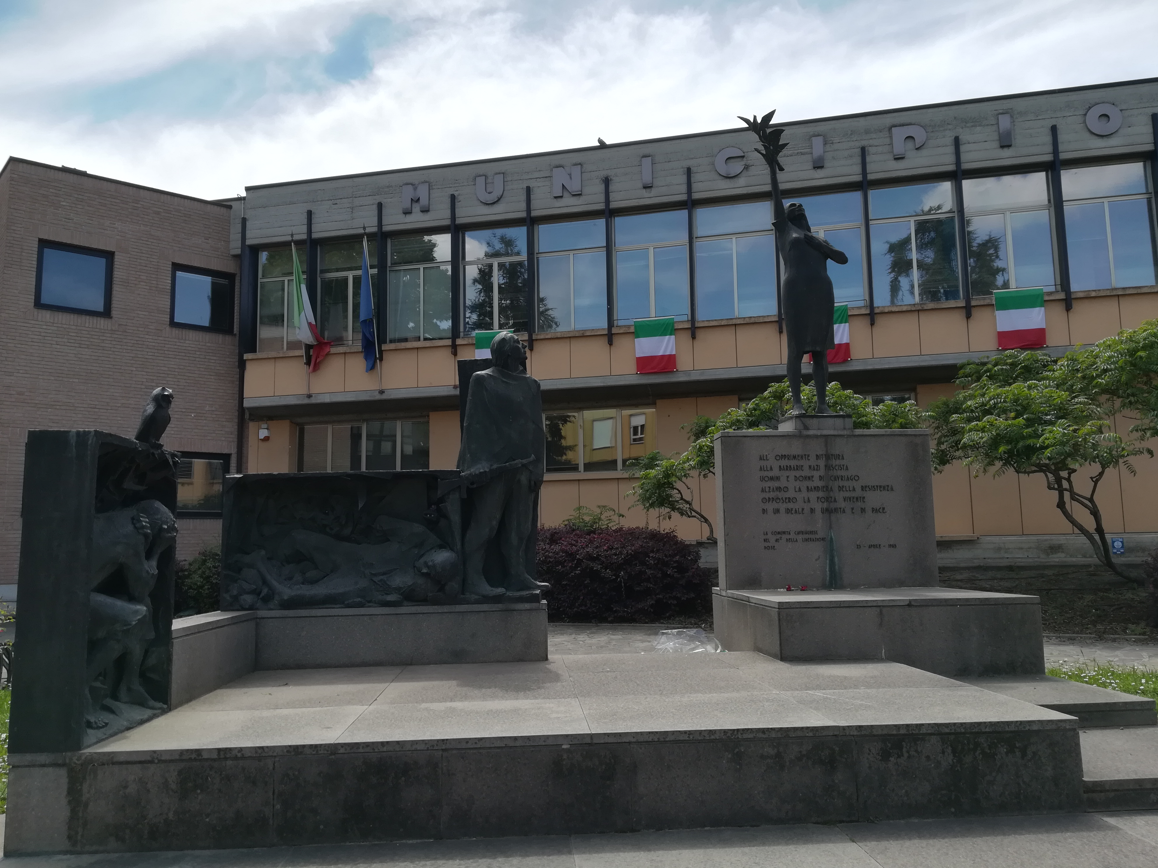 Cavriago (Province of Reggio Emilia)